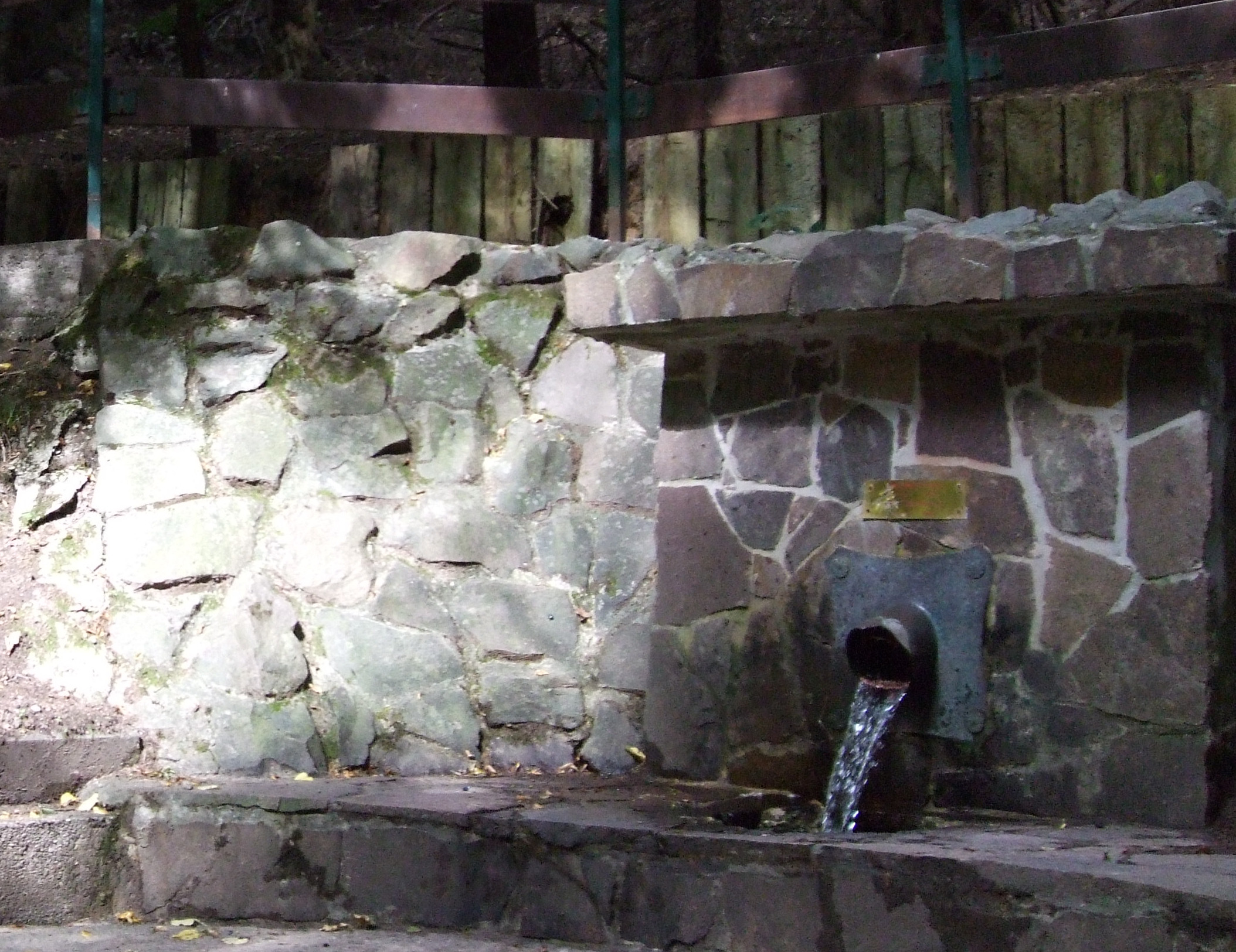 Lindenquelle am Glashütter Weiher, Rohrbach (St. Ingbert), Germany